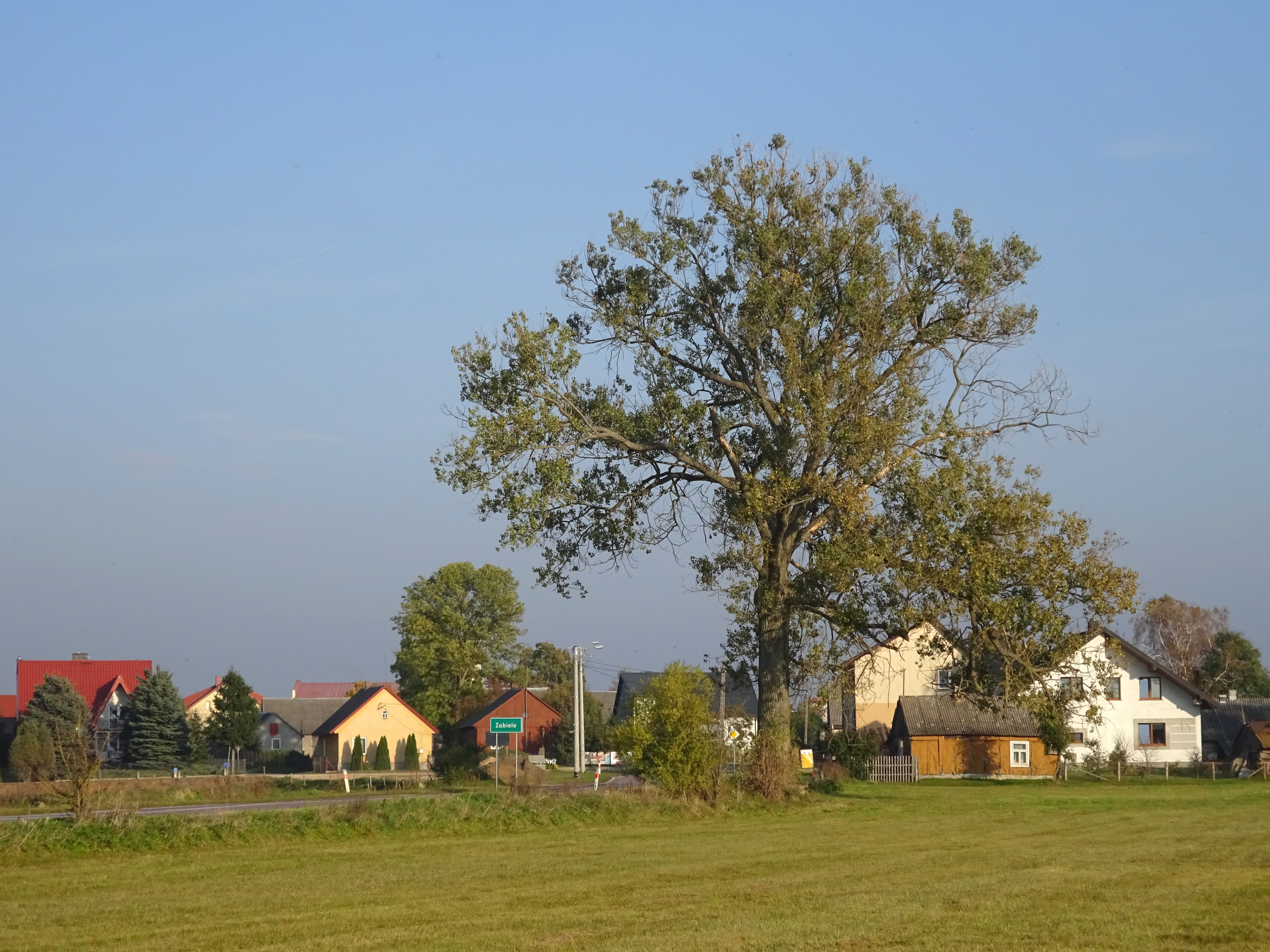 Zabiele (powiat kolneński)